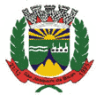 Brasão de Armas do município de São Joaquim de Bicas, Minas Gerais, Brasil.